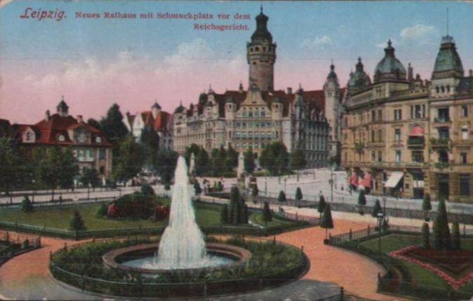 AK Harkortstraße Ecke Rathausring + Villa Otto Nauhardt (Karl-Tauchnitz-Straße 2), im Vordergrund Springbrunnen der Fritz-von-Harck-Anlage